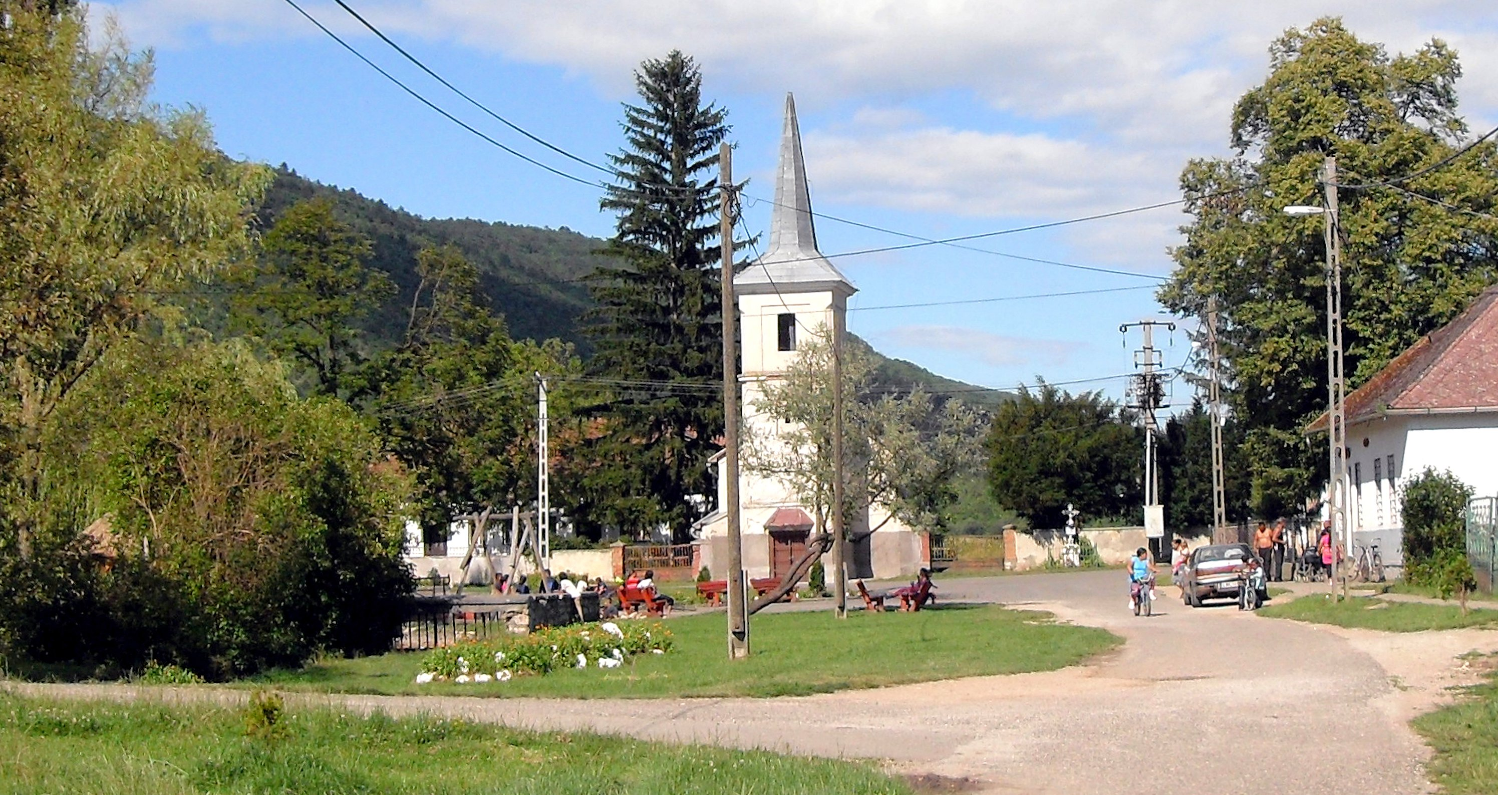 Római katolikus templom, Tornanádaska